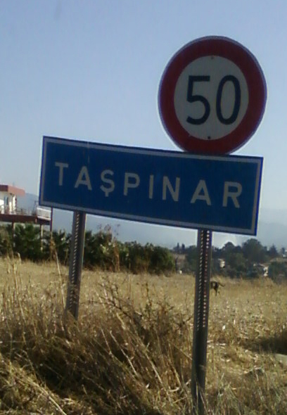 Kıbrıs'taki Taşpınar köyüne gelindiğini belirten bir tabela.